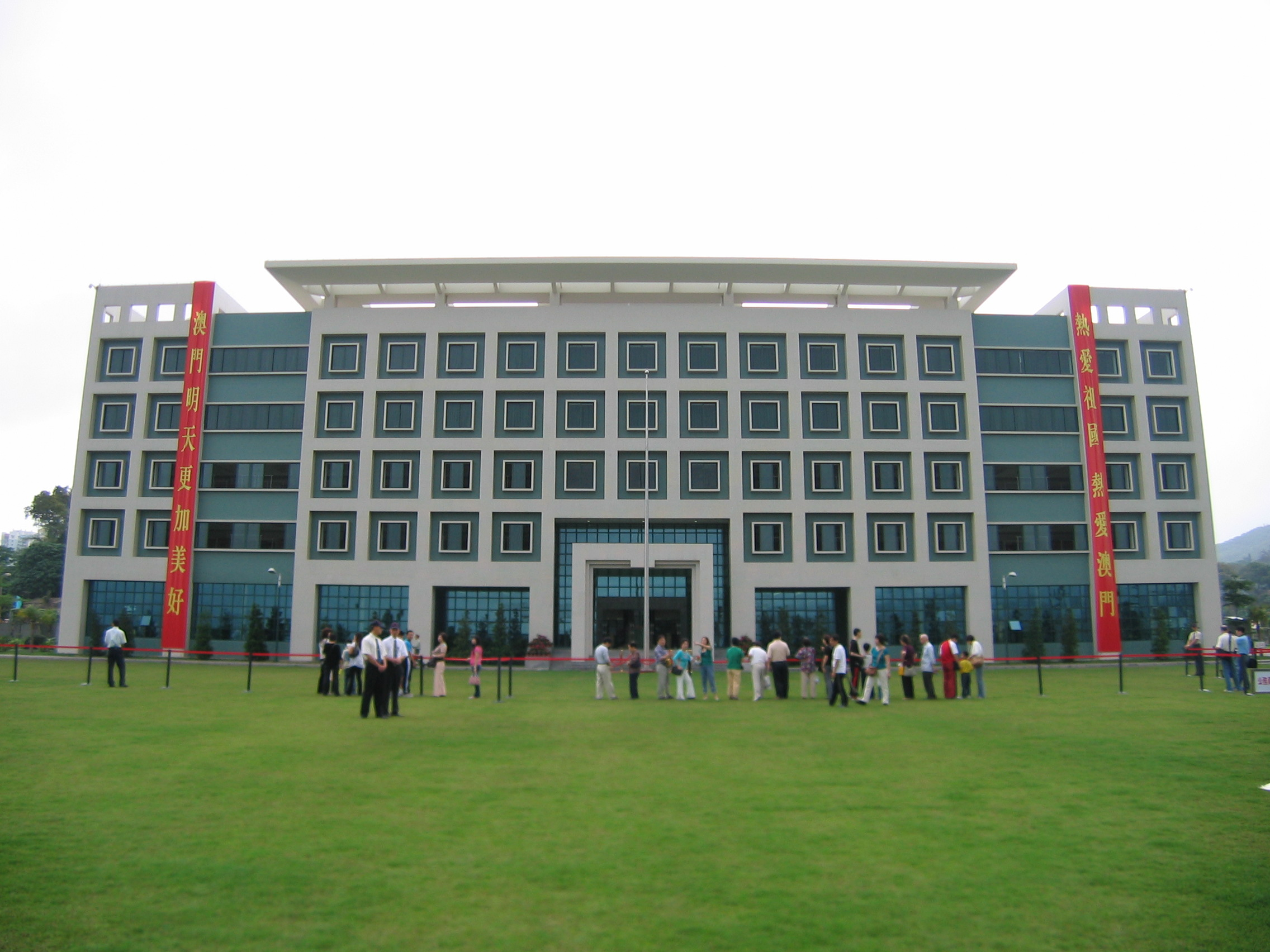 中國人民解放軍駐澳門部隊在離島的軍營